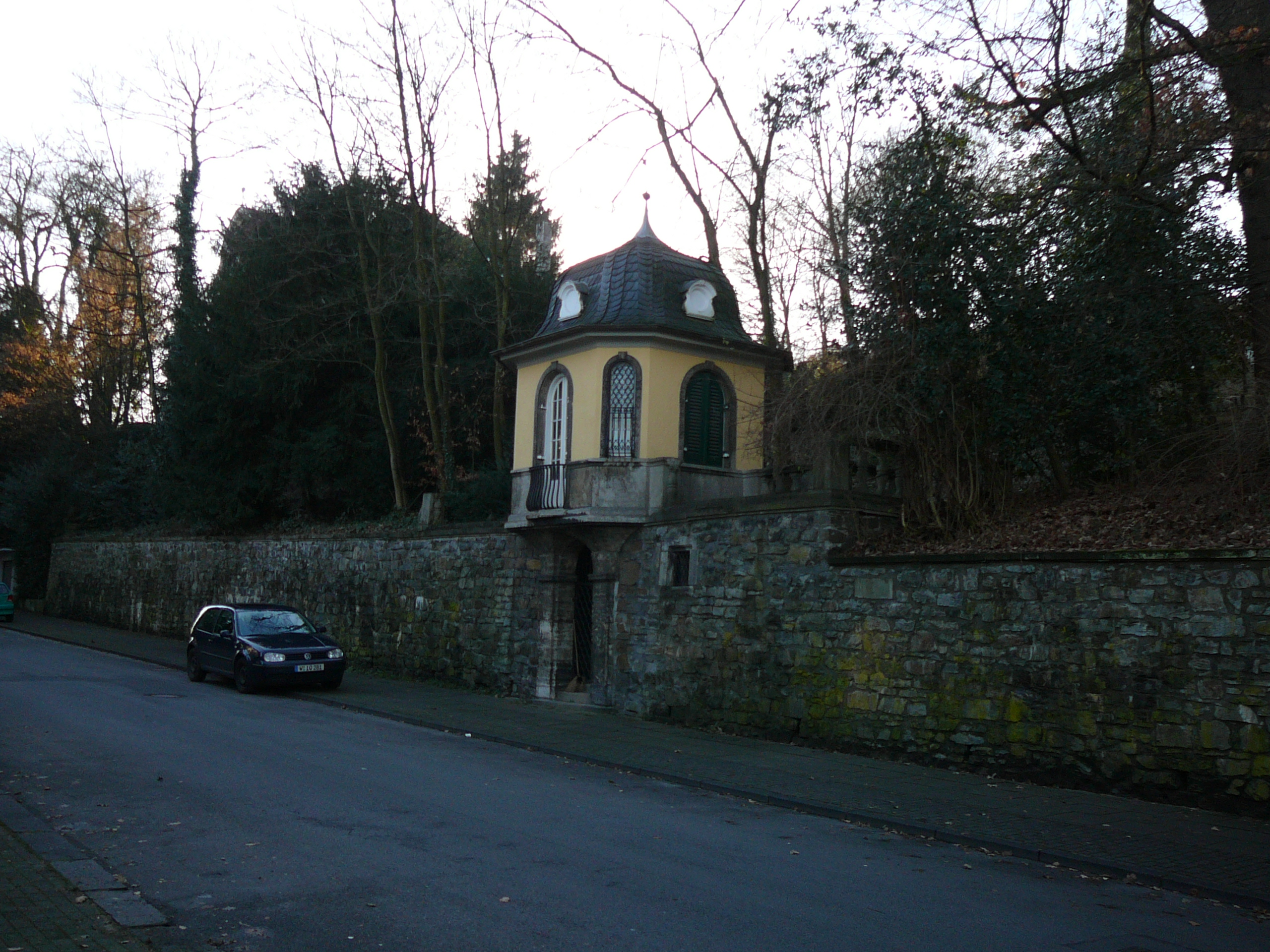 Pavillion im Briller Viertel, Moltkestr, Wuppertal